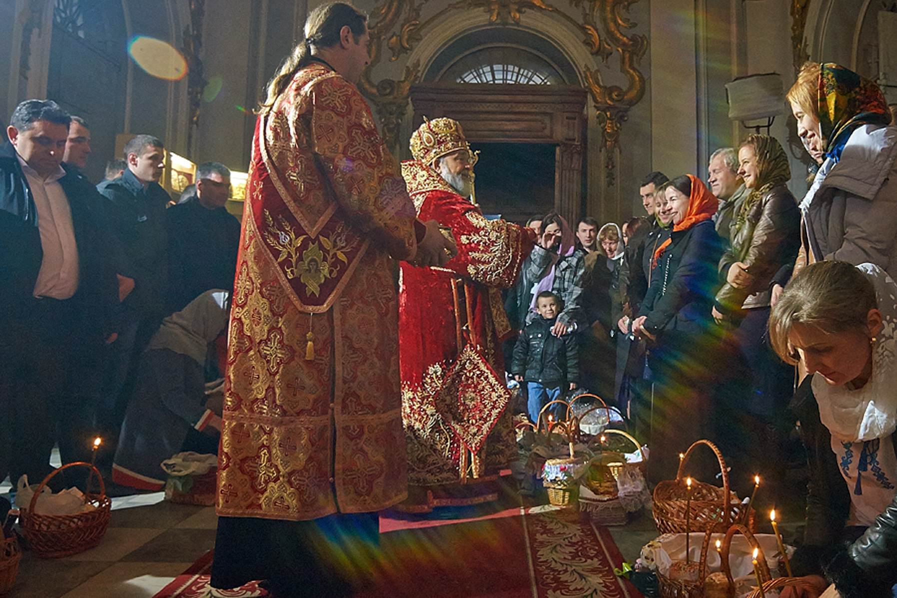 Митрополит Мефодій в Андріївській церкві освячує великодні кошики 20 квітня 2014 року.jpg